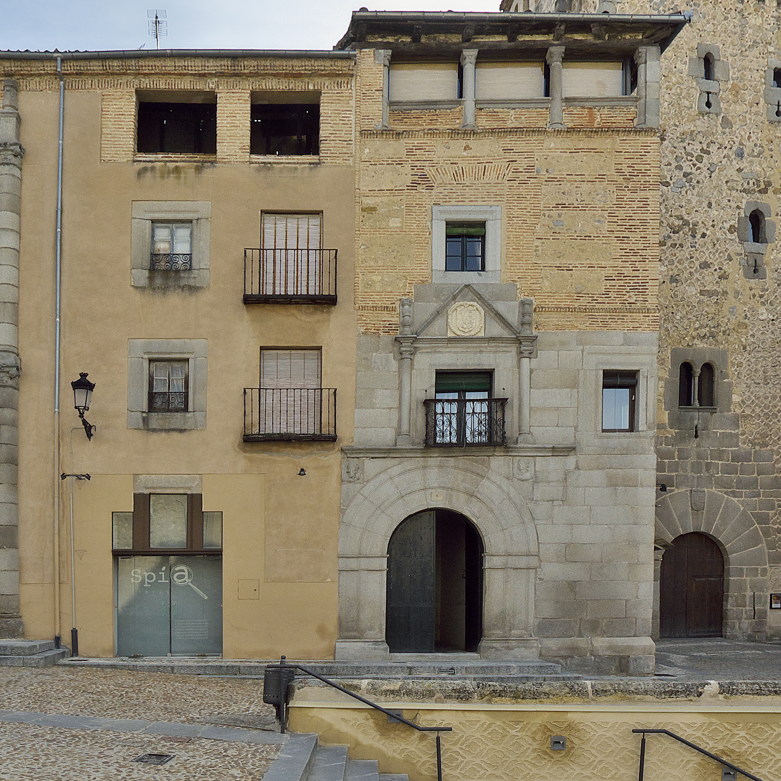 Plaza de San Martín. Casa blasonada de Segovia.